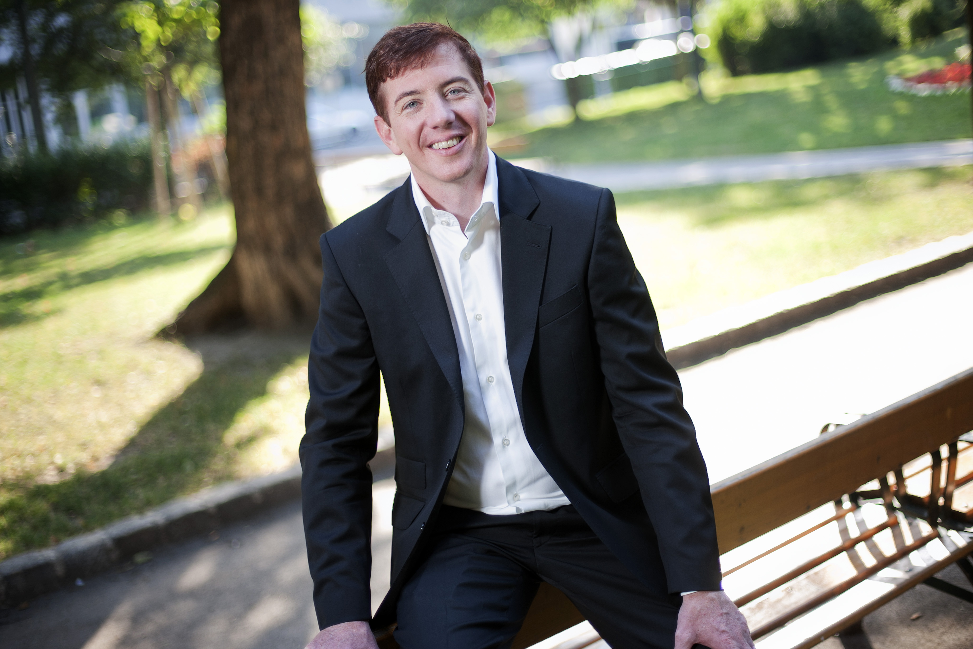 Peter McDonald (2013), Fotograf: Bubu Dujmic